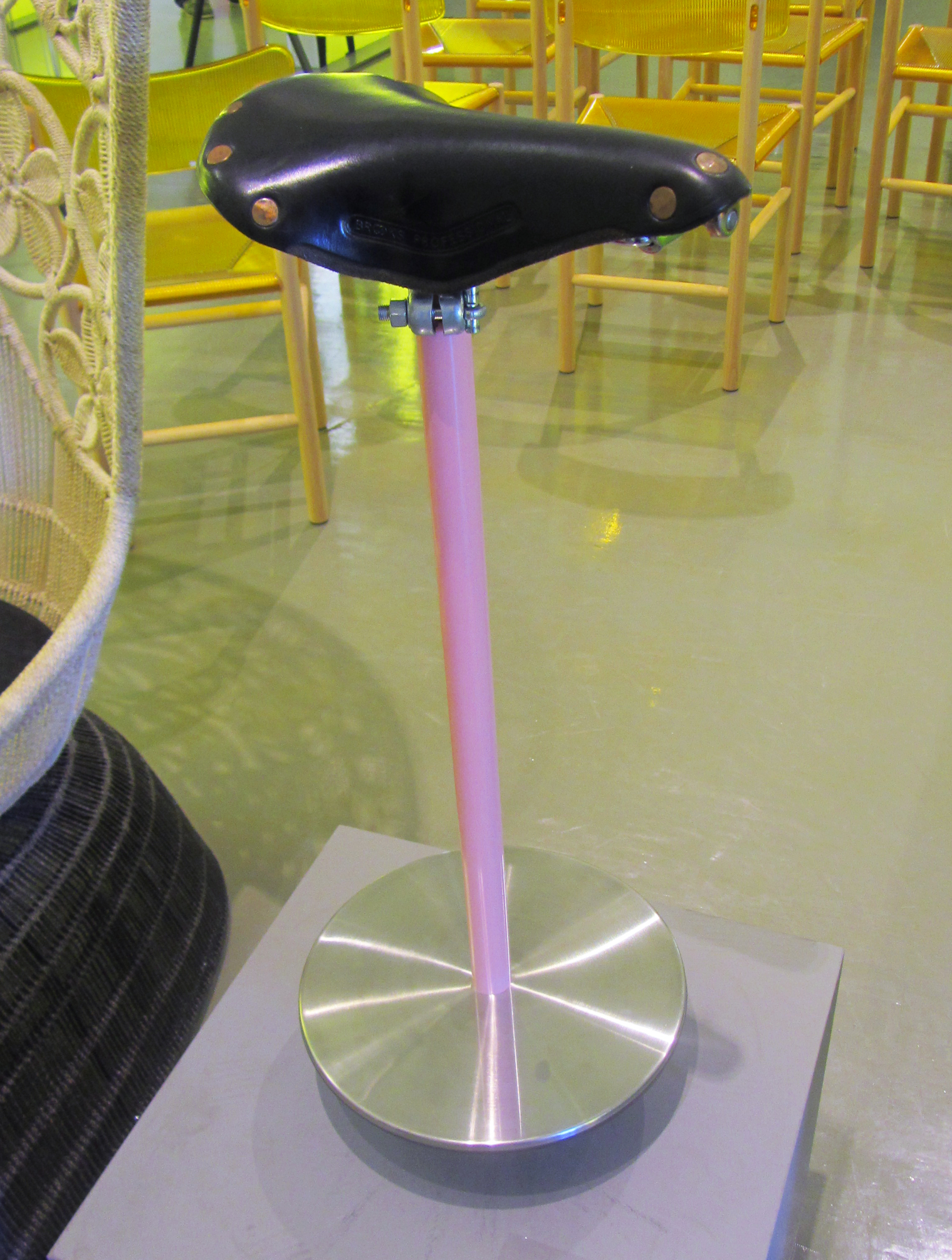 Lo sgabello "Sella" 1957 di Achille Castiglioni Pier Giacomo Castiglioni per Zanotta esposto al Triennale Design Museum. 2011